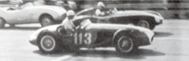 Bandini-offy sport siluro tratta da Libro: Bandini (storia della vita e automobili di Ilario Bandini)